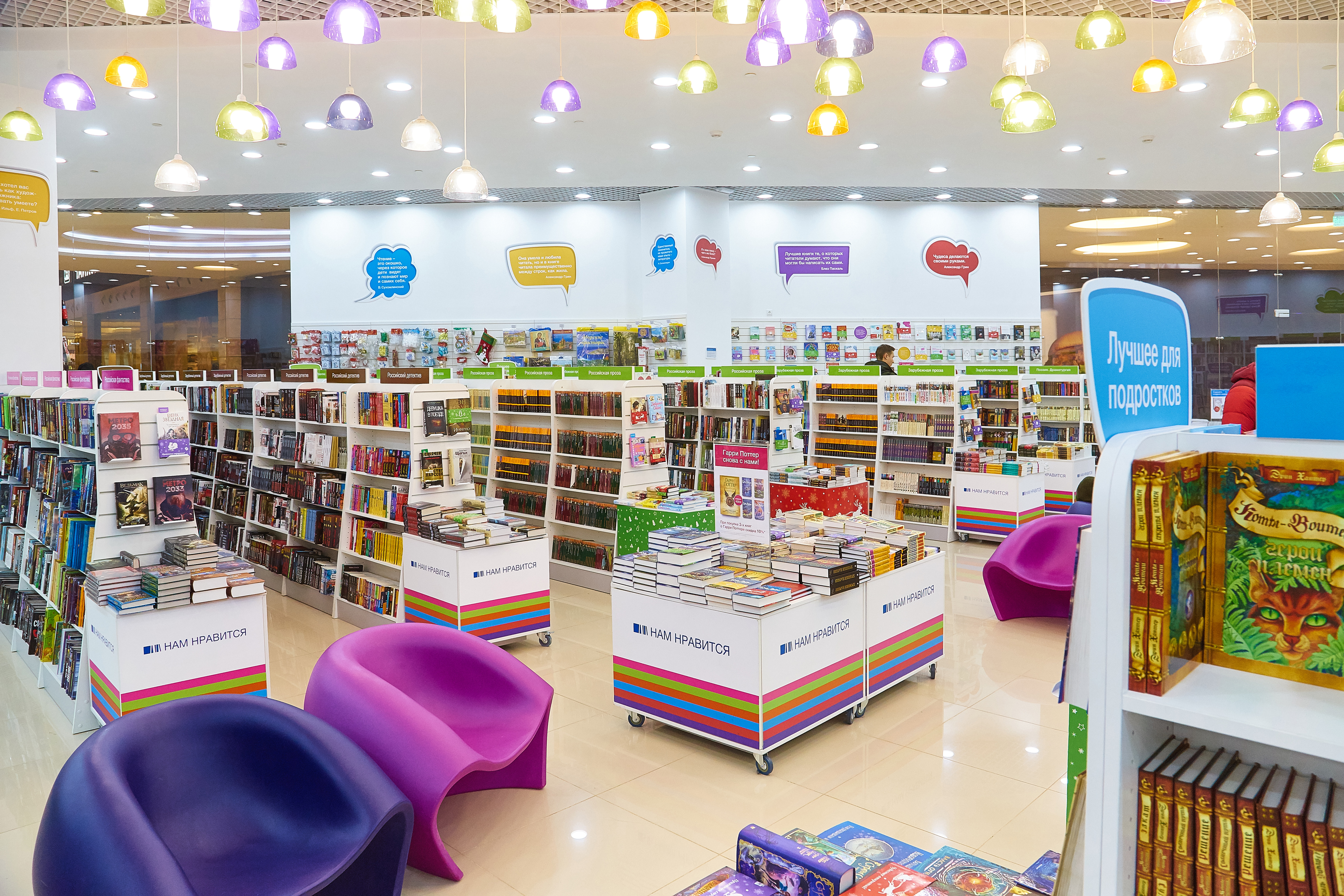 Торговый зал